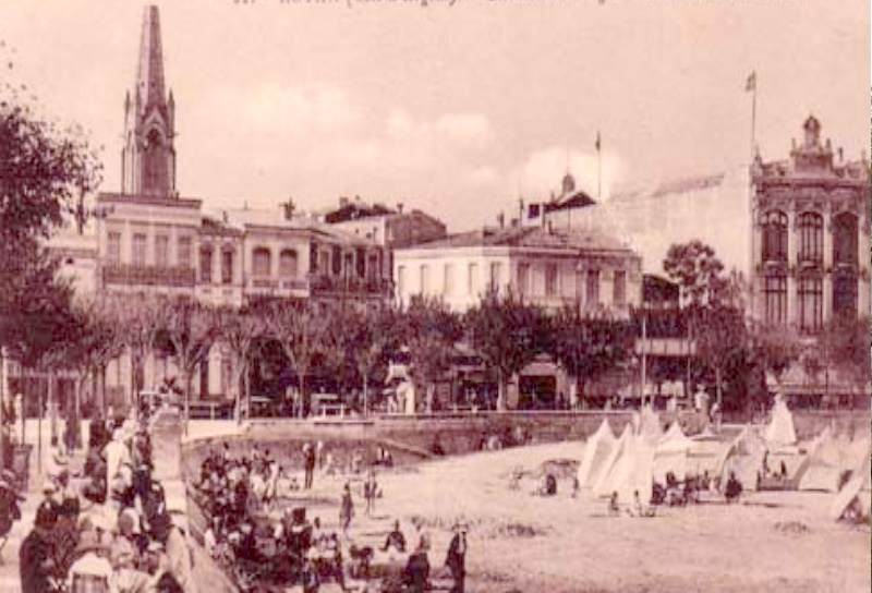 Royan avant la guerre ( 1928 )